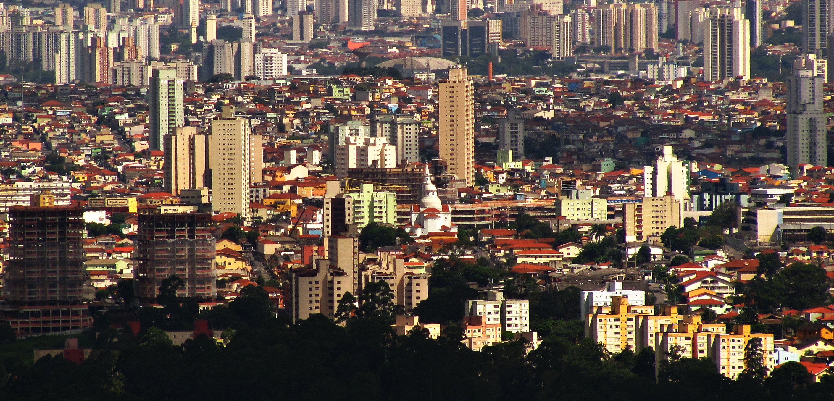 Coração do Bairro do Tucuruvi visto da Cantareira